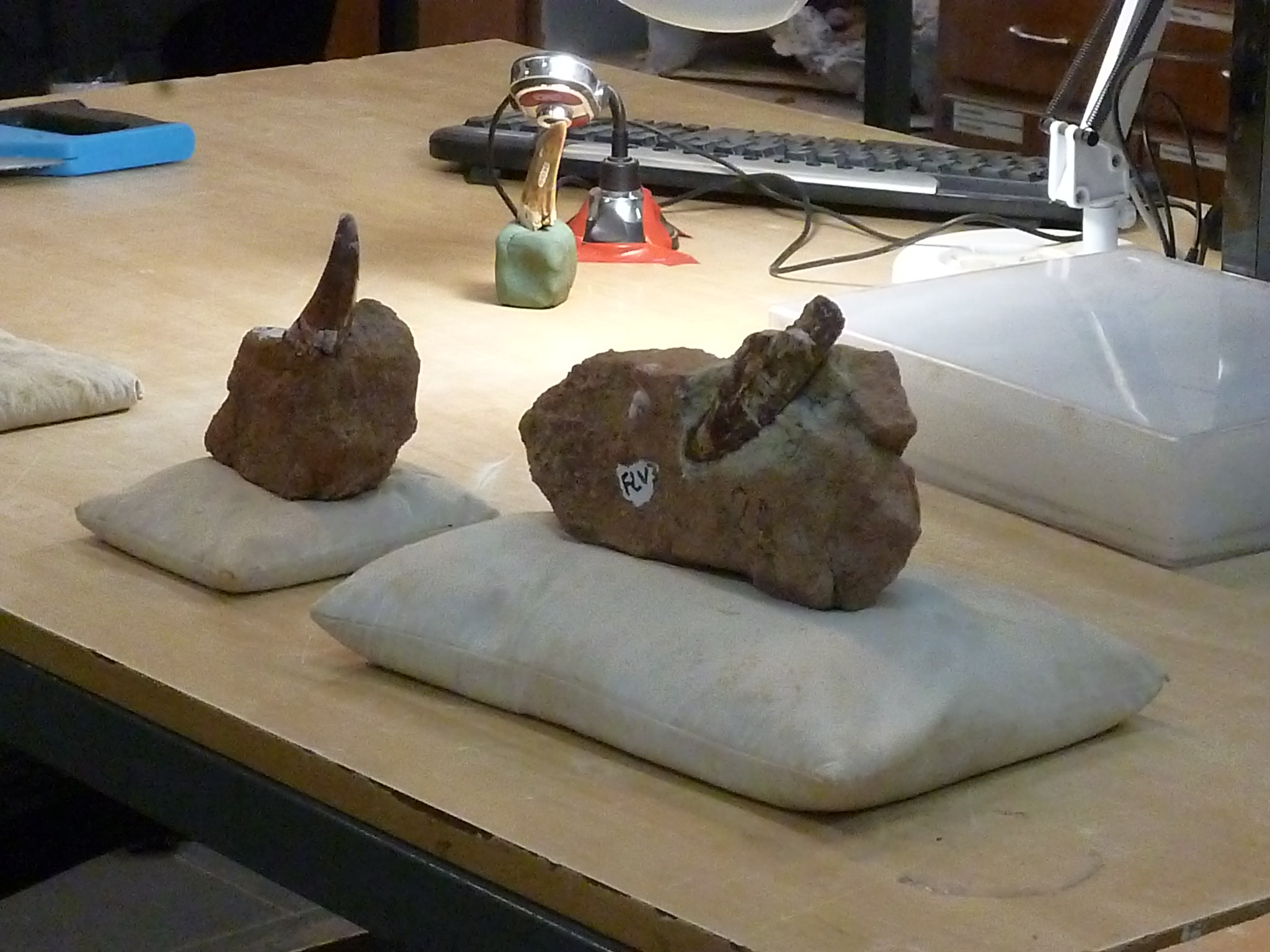 Dientes del Tyrannotitan en el laboratorio del MEF de Trelew